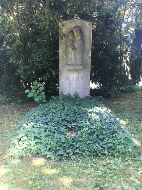 Grab von G. Beda